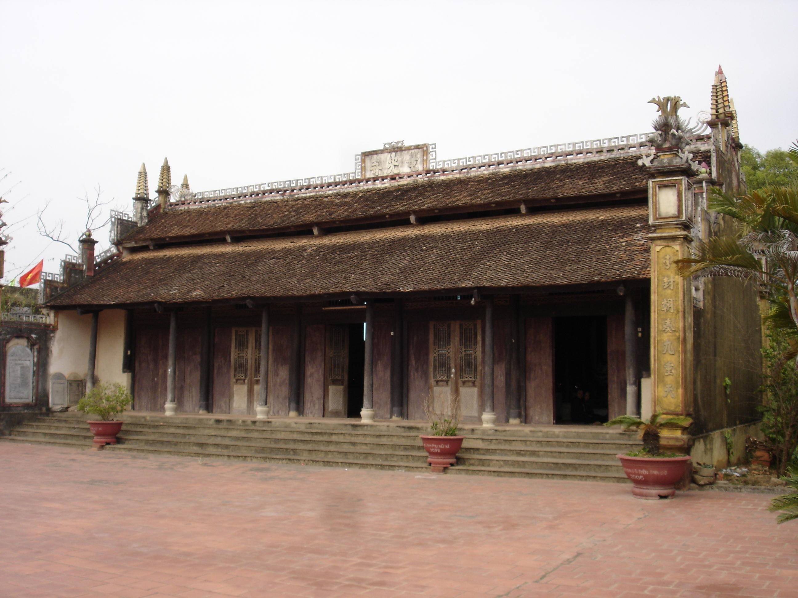 Chùa Thái Đào xưa kia là một ngôi chùa lớn, có tên chữ là Long Quang Tự ( chùa Long Quang Tự).